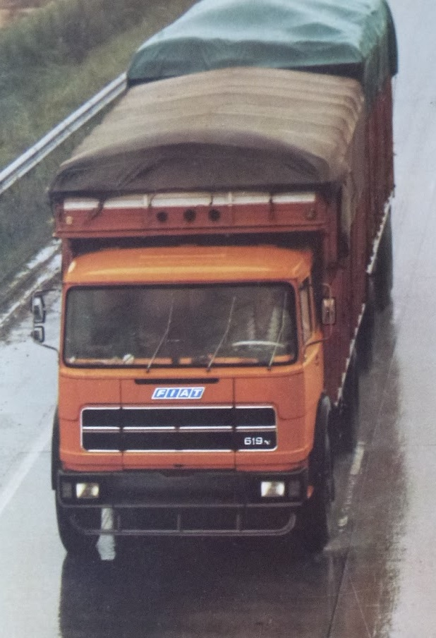 Camión Fiat 619 Argentina